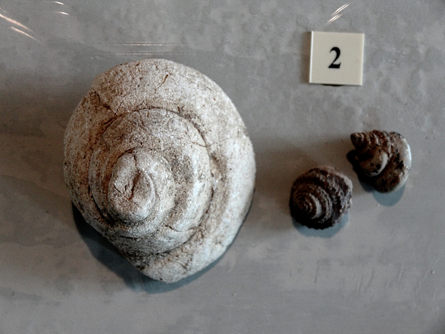 Kreiselschnecke Trochus subduplicatus dem Schwarzen Jura der Fränkische Alb; Fundort nahe Bad Staffelstein /Oberfranken; Exponat in der Petrefaktensammlung Kloster Banz